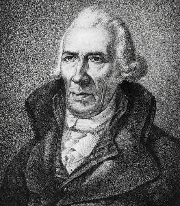 Johann Gottwerth Müller (gest. 1828), gezeichnet von Ferdinand Wolfgang Flachenecker 1818, auf Stein gez. von S. Bendixen, Stadtarchiv Itzehoe